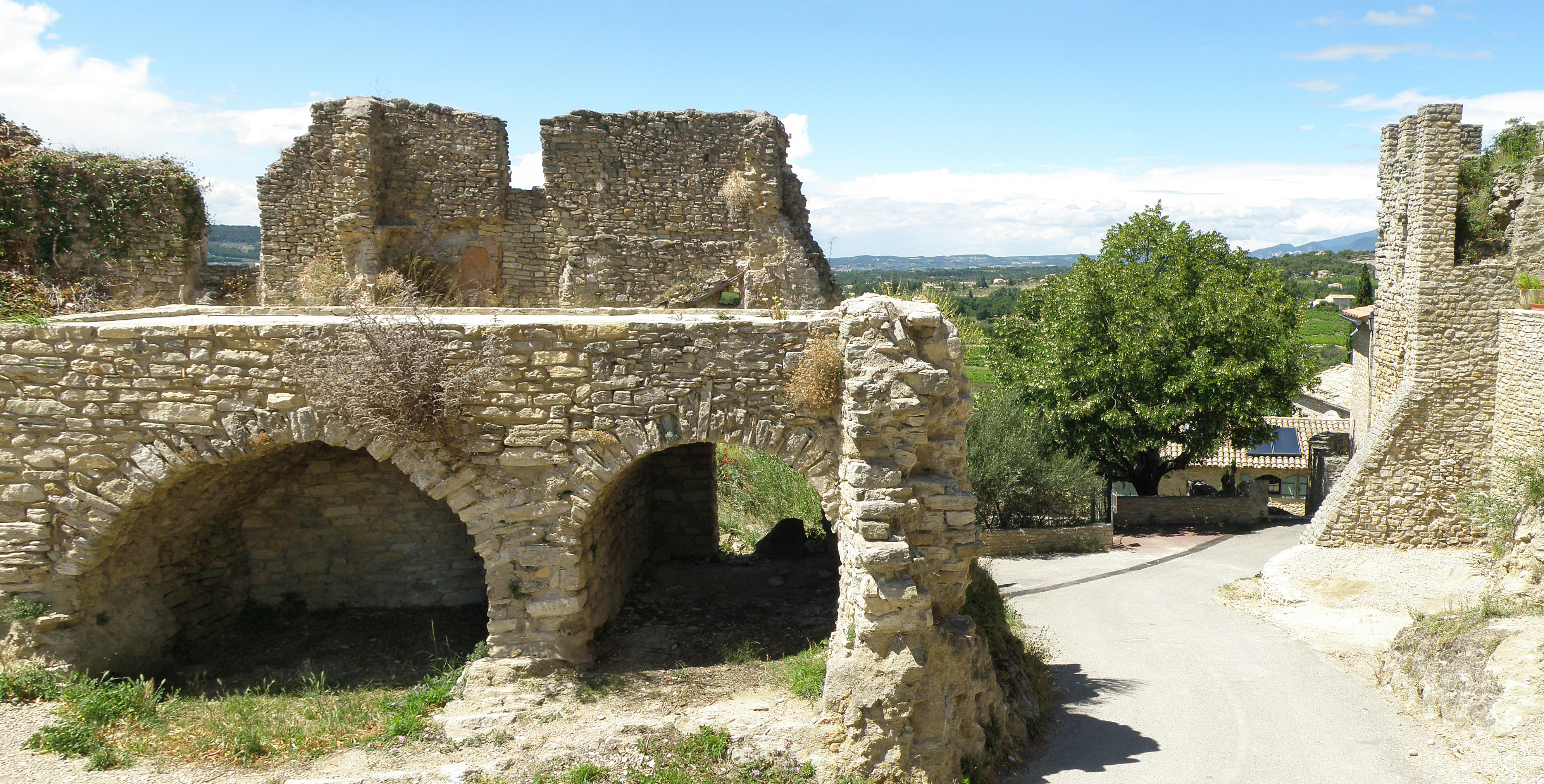 Faucon (Vaucluse, France). Vestiges de l’ancienne muraille d’enceinte.